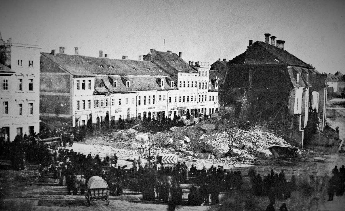 Mieszkańcy Chojnowa zgromadzeni wokół zawalonej wieży chojnowskiego Ratusza. Do katastrofy doszło 7 marca 1875 roku. W wyniki zdarzenia śmierć poniosła mieszkanka Chojnowa - Anna Peikert. Wkrótce po katastrofie pozostałości ratusza zostały rozebrane.